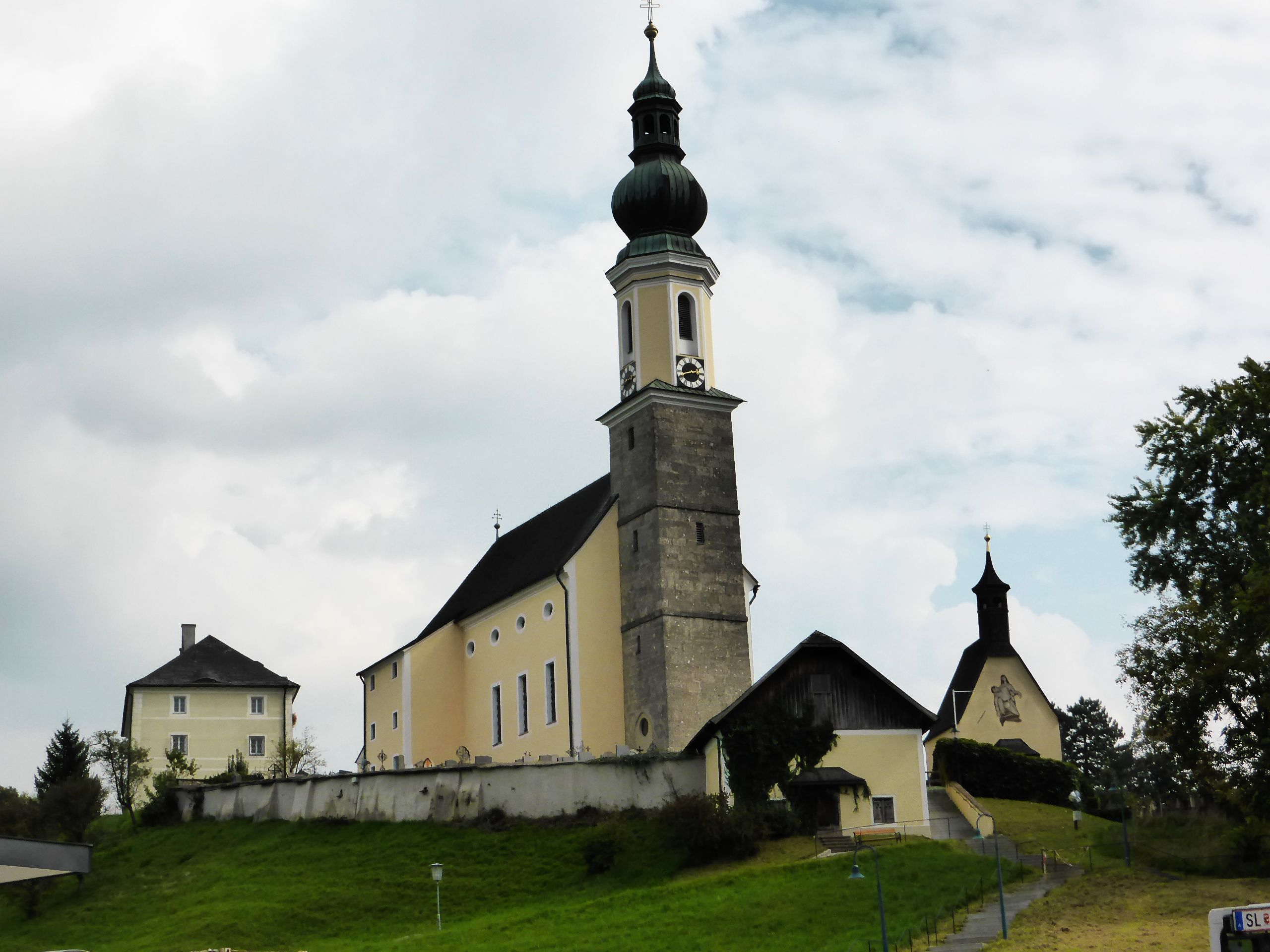 Dekanatskirche hl. Georg